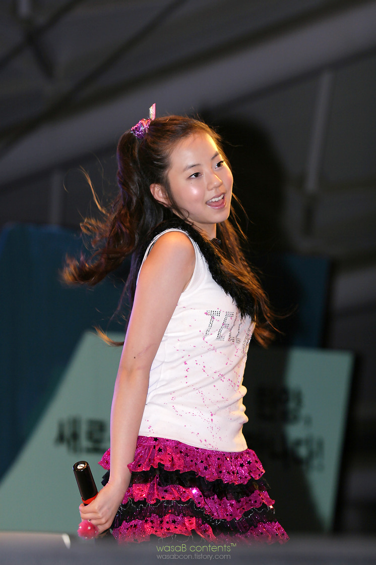 한양대학교에서 Tell Me 공연 중